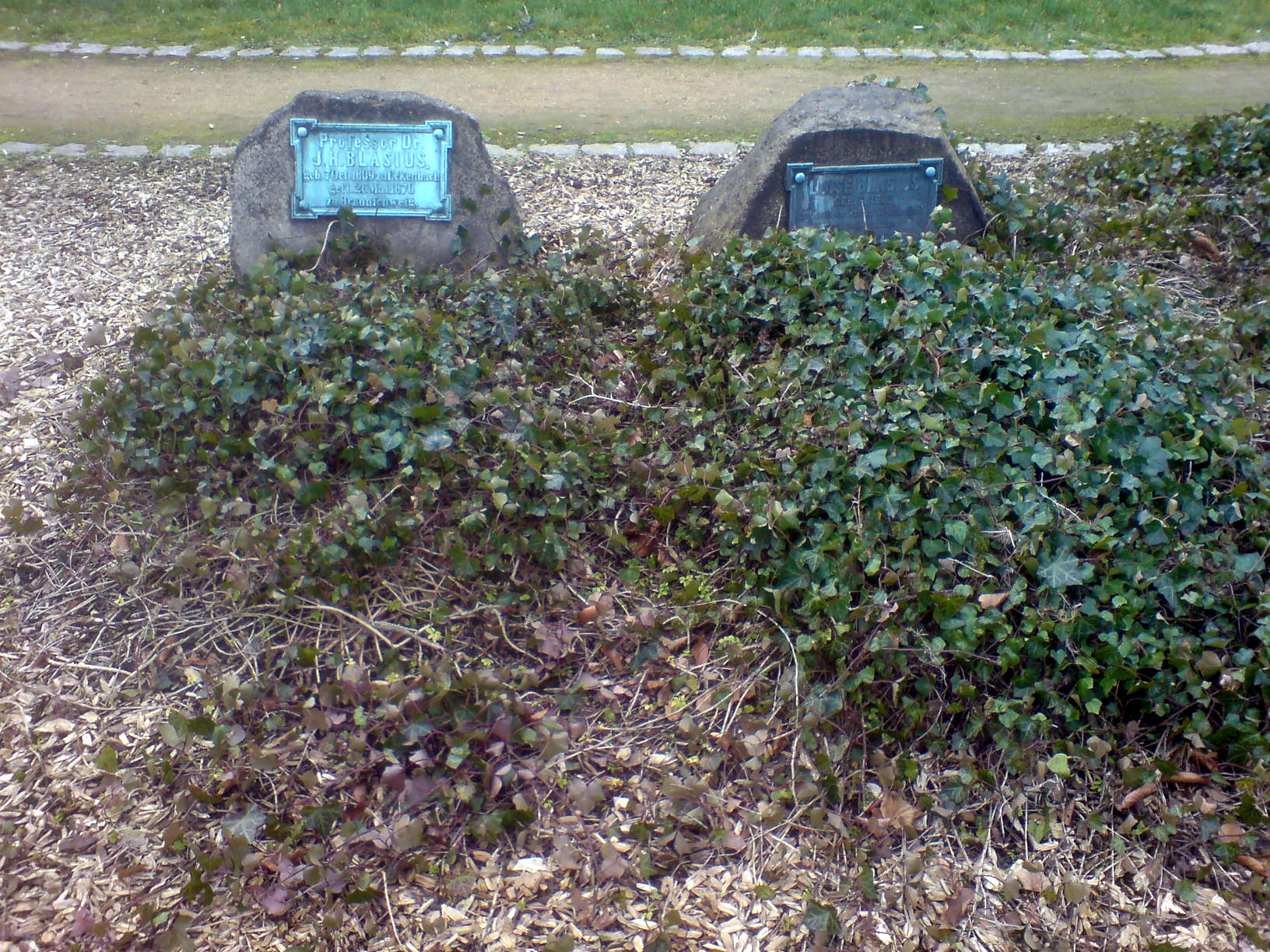 Grabinschriften: "Professor Dr. J.H. Blasius, geb. 7. Oct. 1809 zu Eckenbach, gest. 26. Mai 1870 zu Braunschweig." und "Luise Blasius, geb. Thiele, geb. 12. Feb. 1822 zu Sophienthal, gest. 23. Januar 1886 zu Braunschweig" Foto aufgenommen auf dem Friedhof der Reformierten Gemeinde (Braunschweig, Juliusstrasse.)